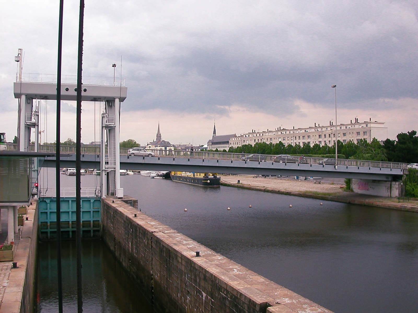 Pont de Tbilissi à Nantes